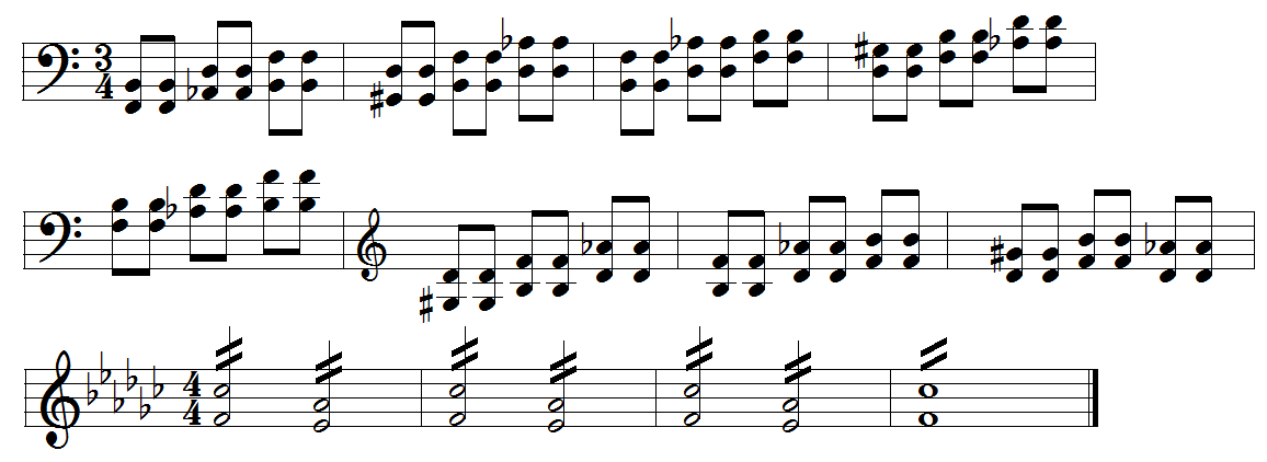 Teil des Intros zu „Tornado“ von Voivod